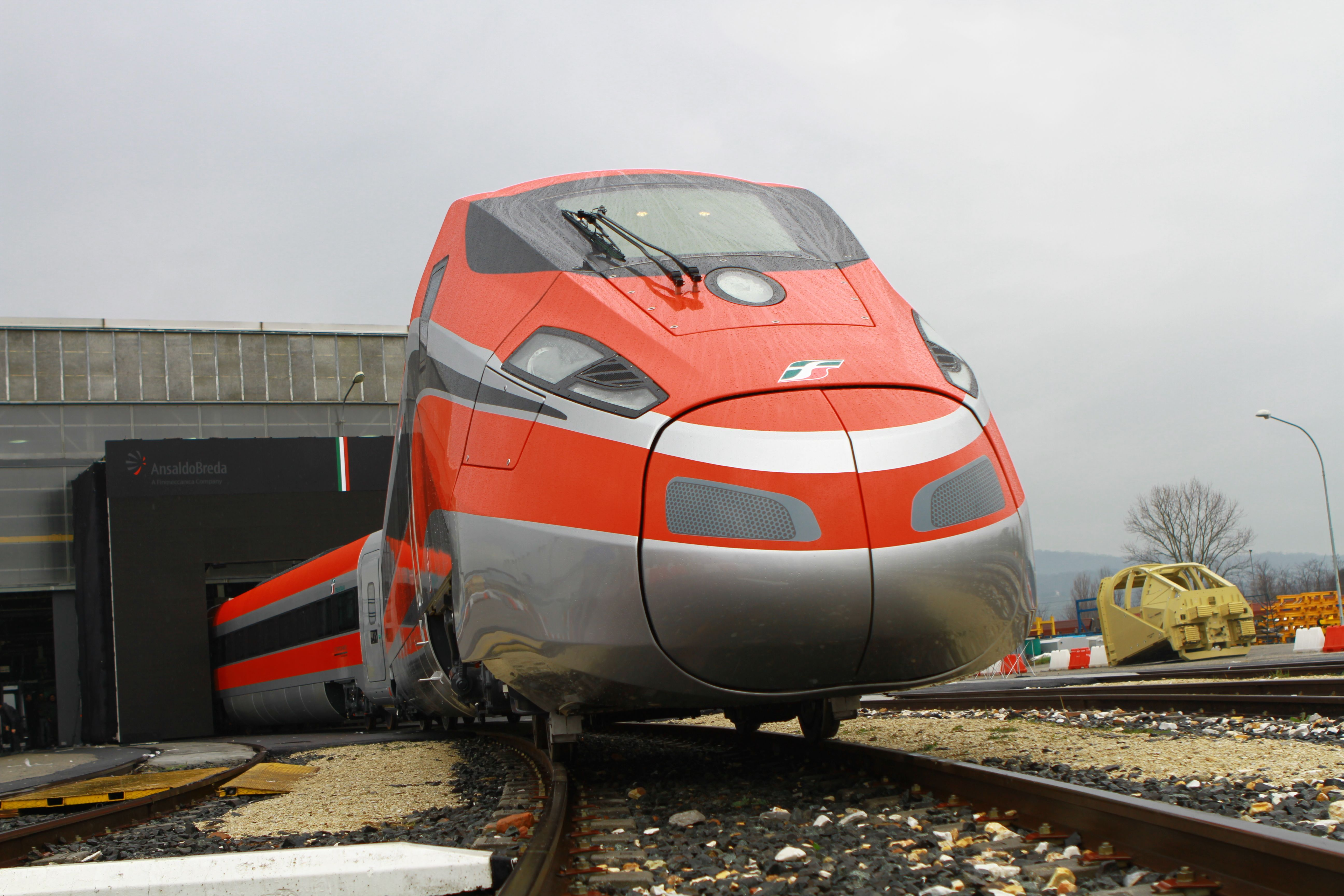 Presentazione del treno ETR1000 avvenuta a Pistoia il 26 marzo 2013